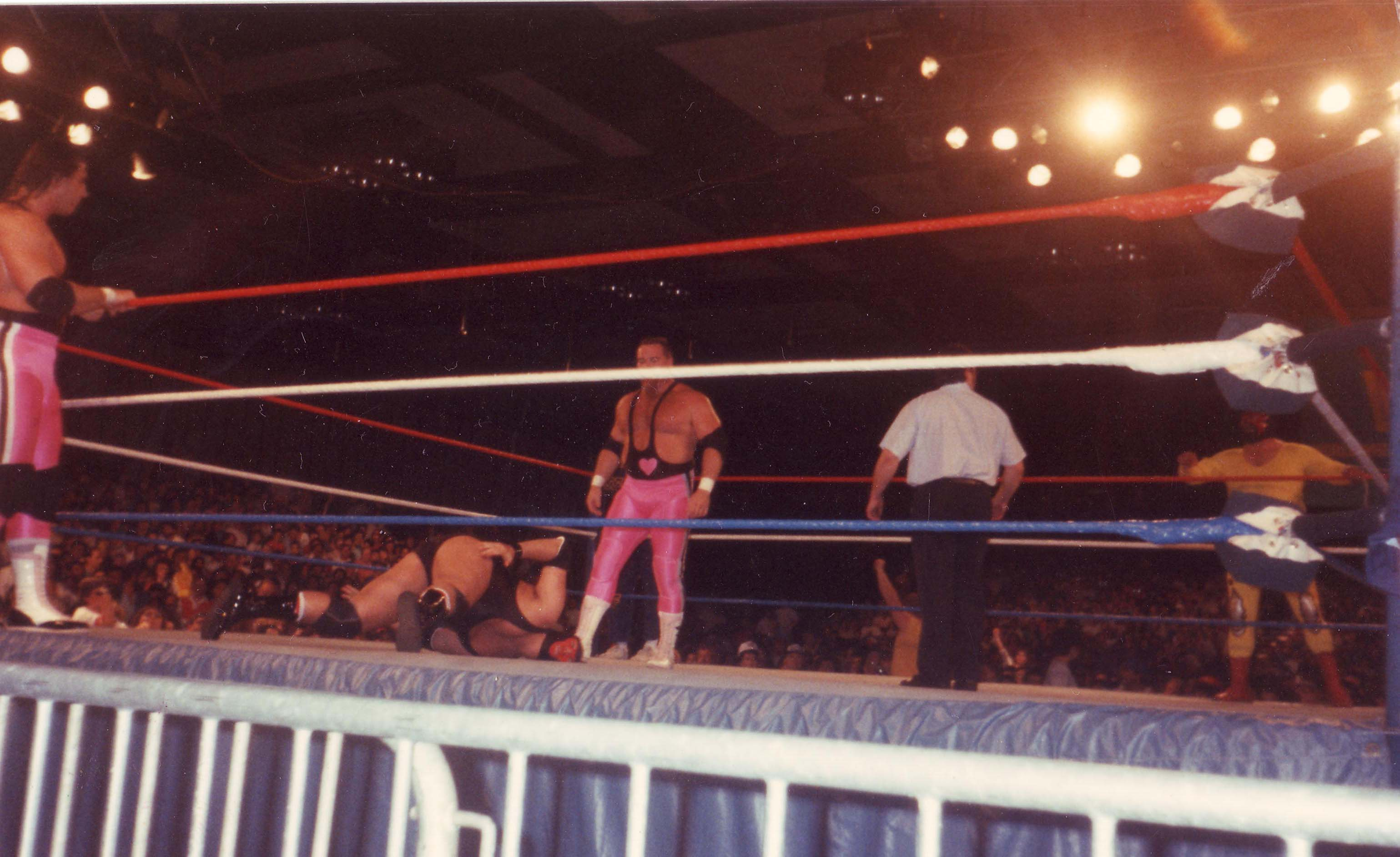 Jim Neidhart and Masked Guy